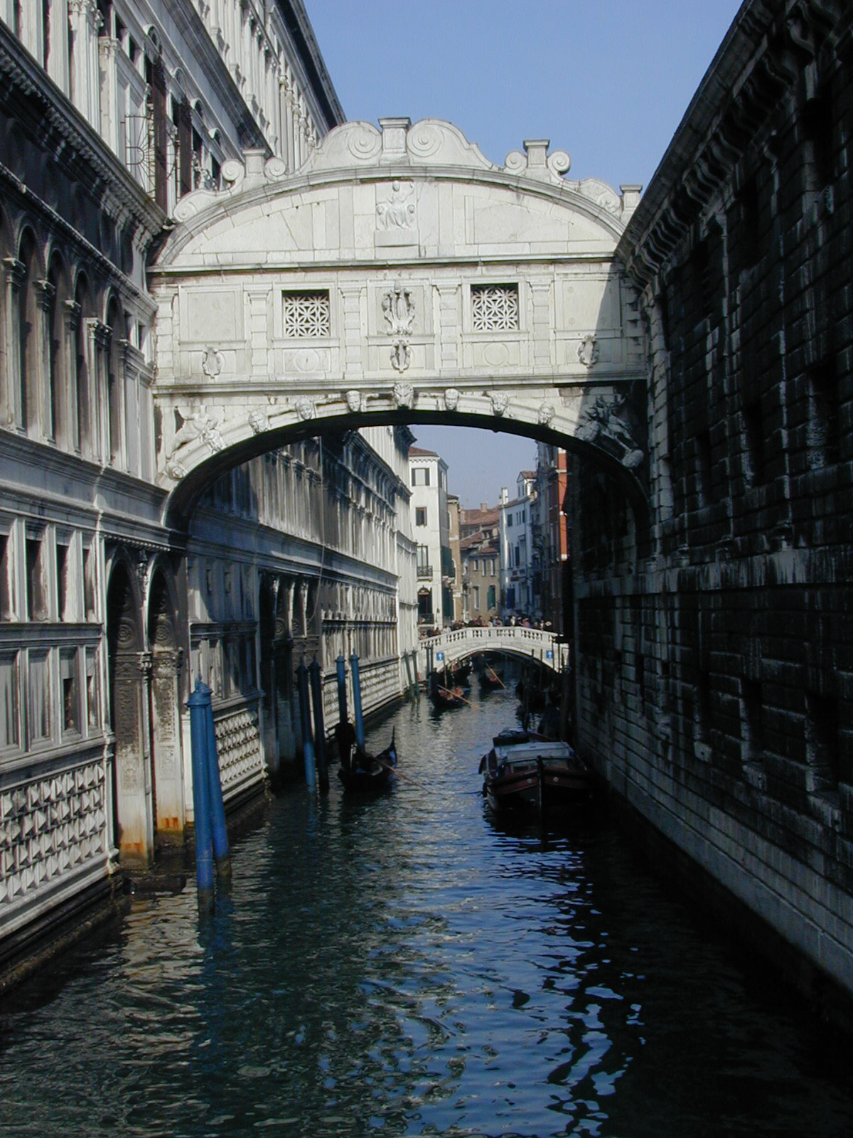 Seufzerbrücke in Venedig